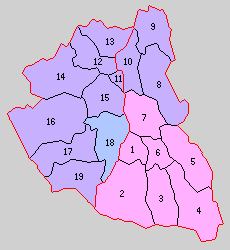 後の福岡県嘉穂郡域の町村制時点の町村。